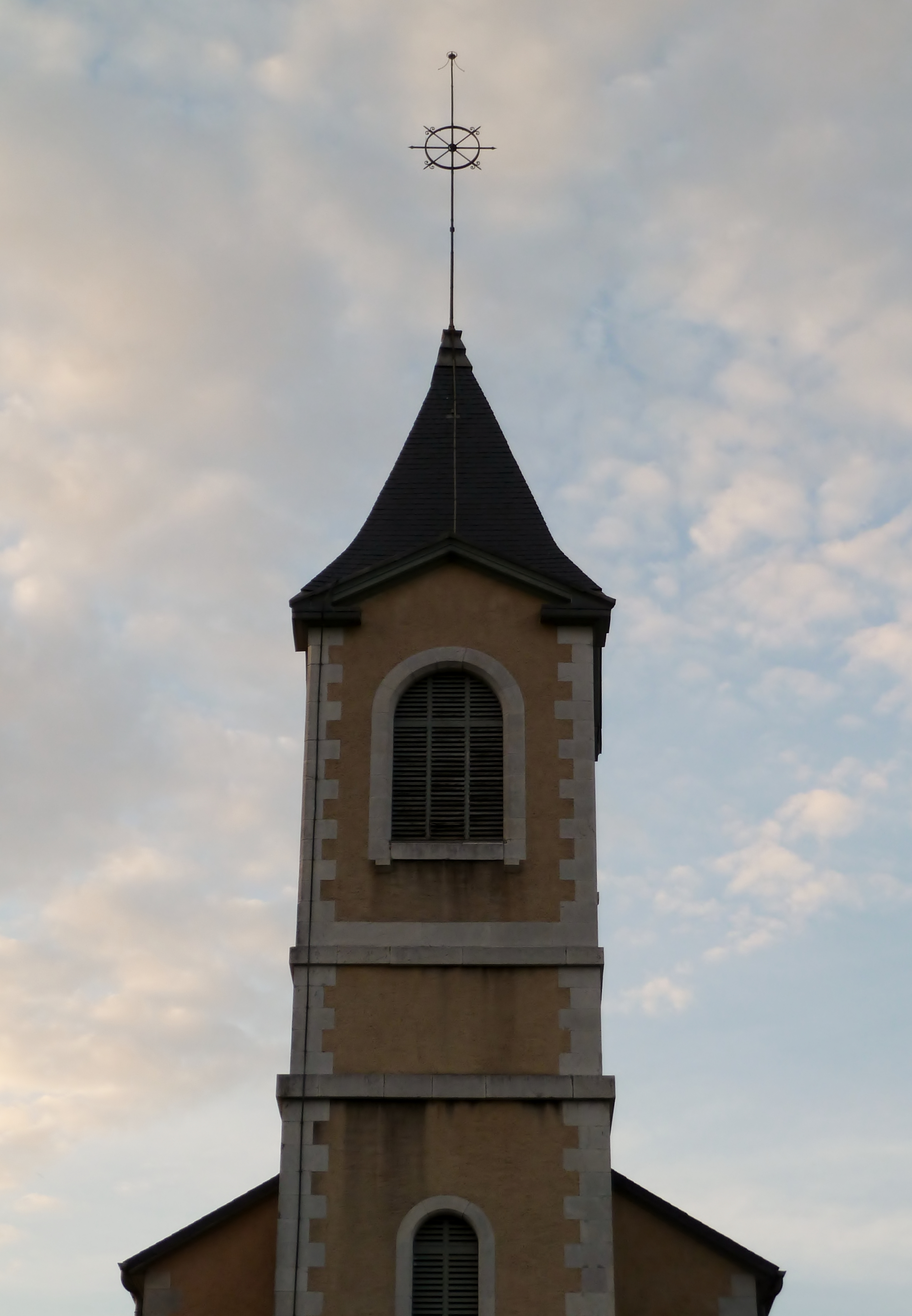 Clocher de l'église de Sendets (Pyrénées-Atlantiques)